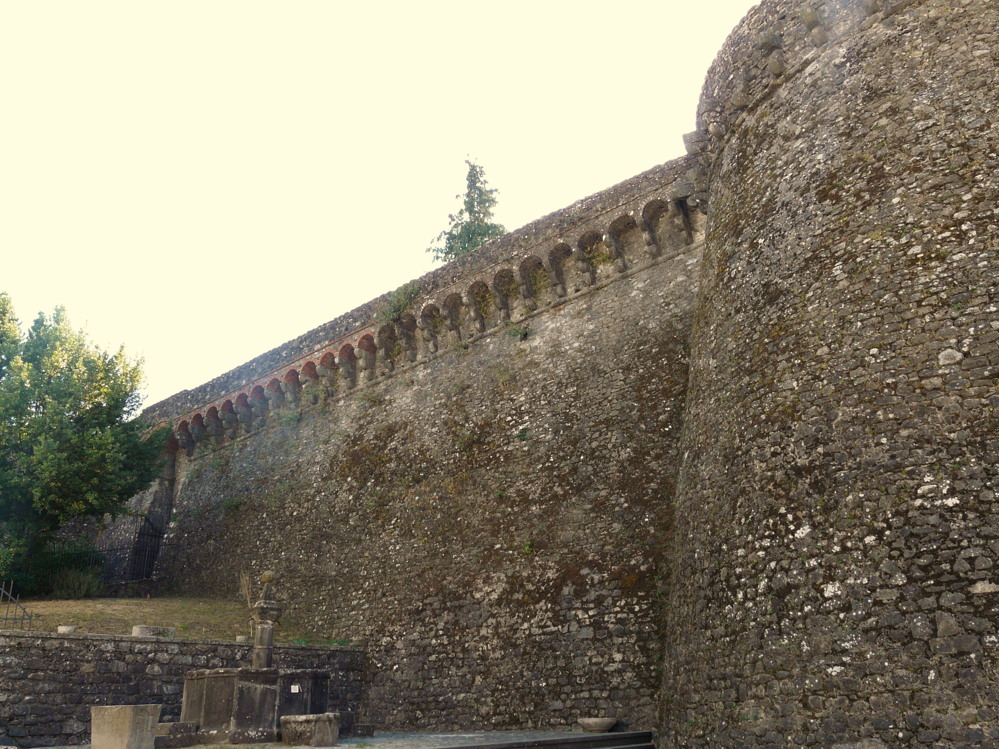 Fortezza di Camporgiano, Toscana, Italia